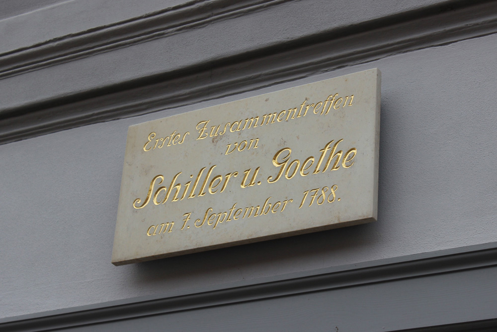 Gedenktafel über der Eingangstür des Schillerhauses in Rudolstadt, Erstbegegnung zwischen Friedrich Schiller und Johann Wolfgang Goethe am 7. September 1788